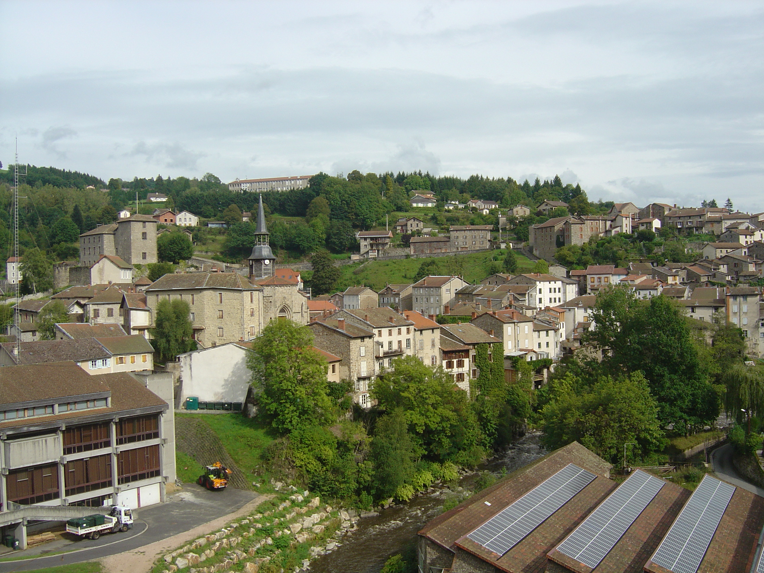 Vue générale du village d'Olliergues depuis l'entrée de la ville